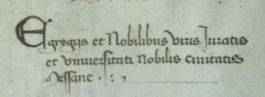 Außenadresse einer Urkunde des Dogen Michele Steno von 1402